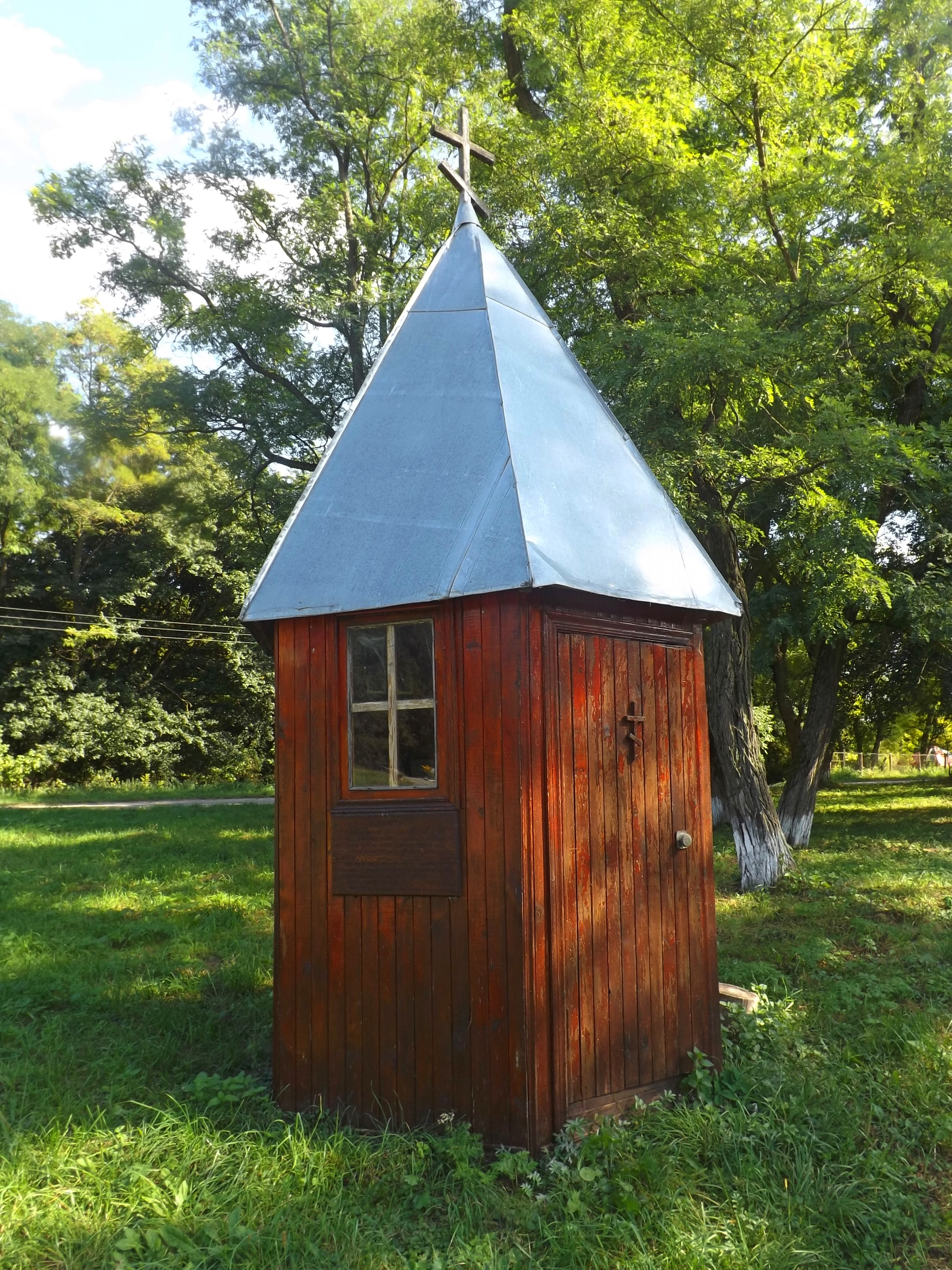 Меморіальний комплекс в с.Ходорів. Каплиця